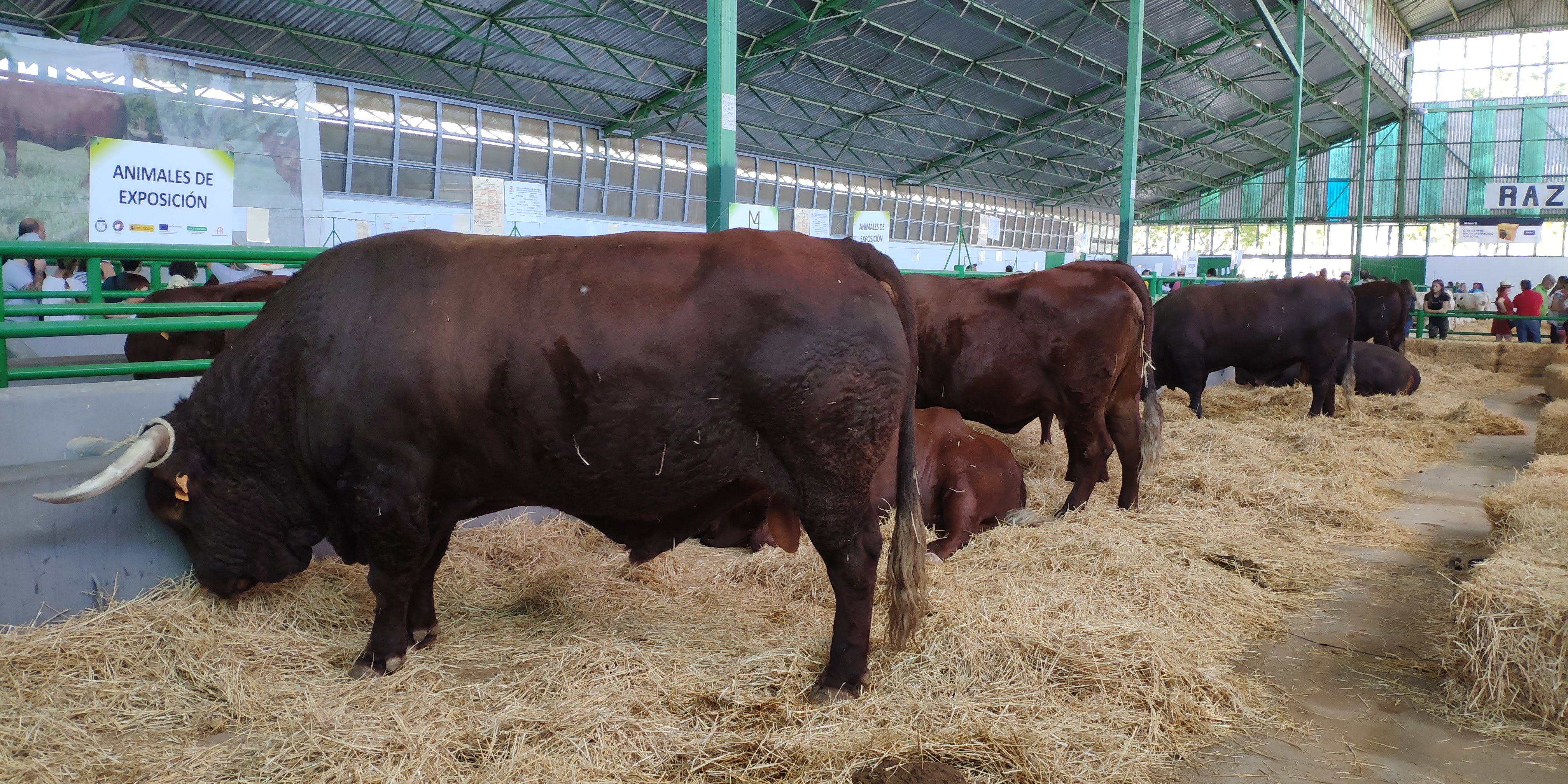 Raza retinta en la Feria de Zafra, Badajoz (2019)